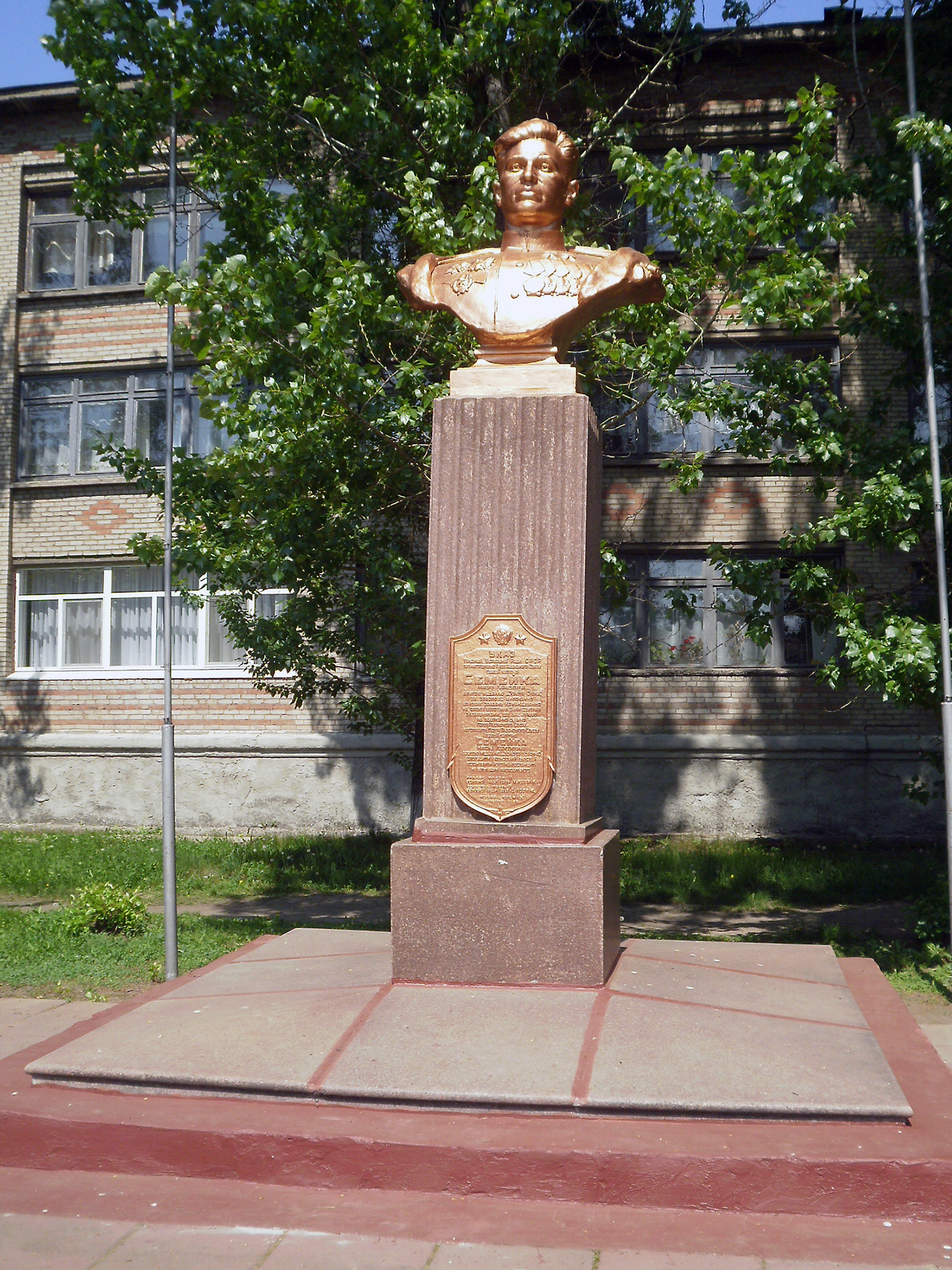 Бюст Миколи Семейка у Слов'янську біля школи № 12, у який він учився. Створений у 1948, скульптор С. Н. Попова. До 1956 стояв на однойменній площі.